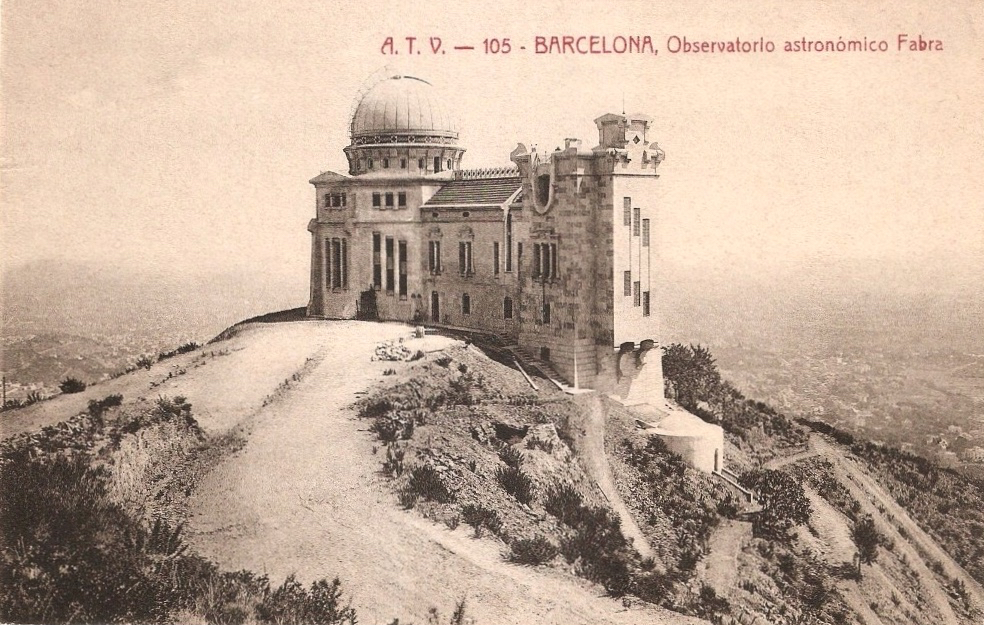 Observatoire astronomique Fabra (fondé en 1904), Barcelone, carte postale ancienne.